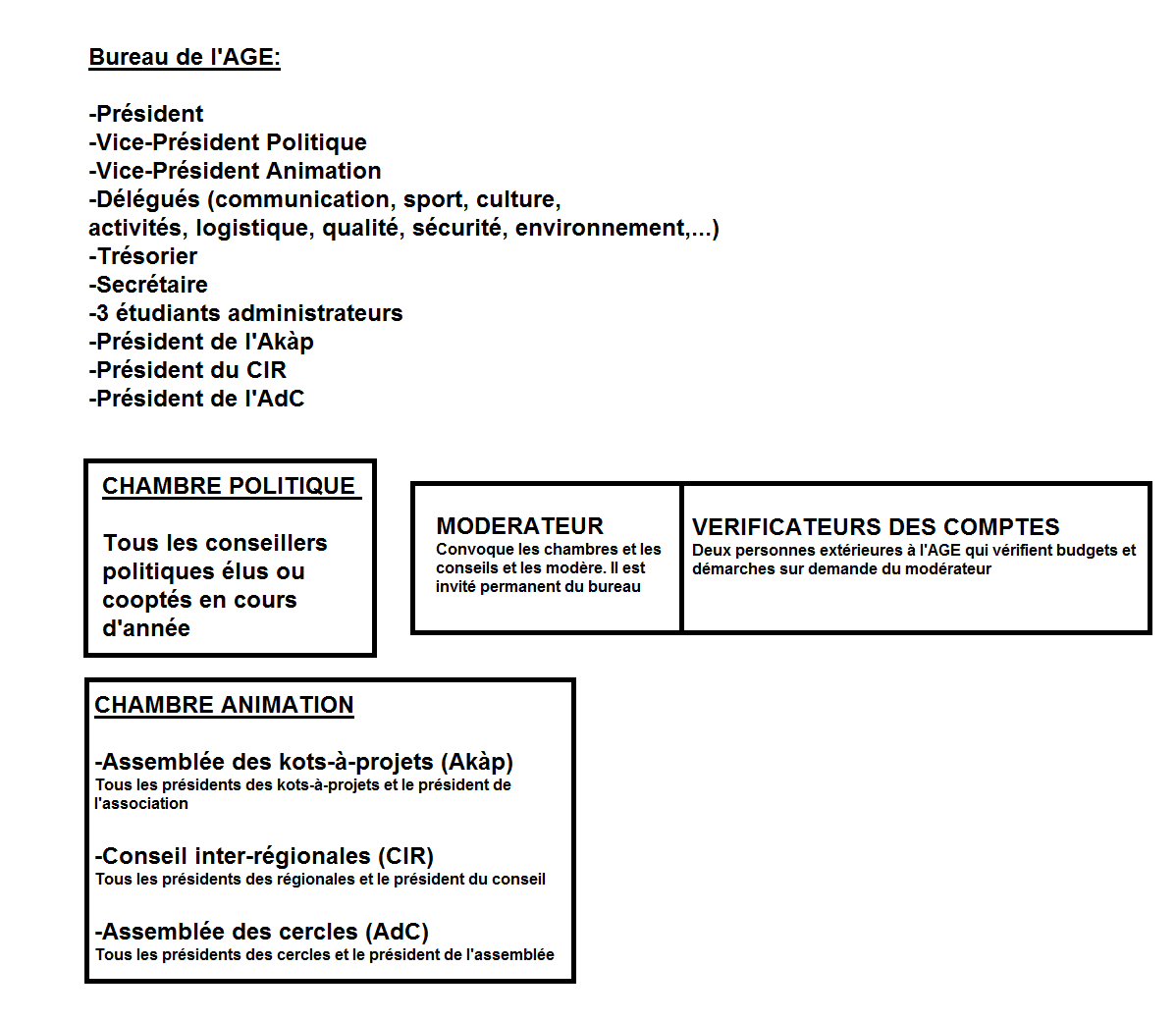 Schéma rédigé rapidement pour résumer la composition de l'assemblée générale des étudiants de l'UNamur.